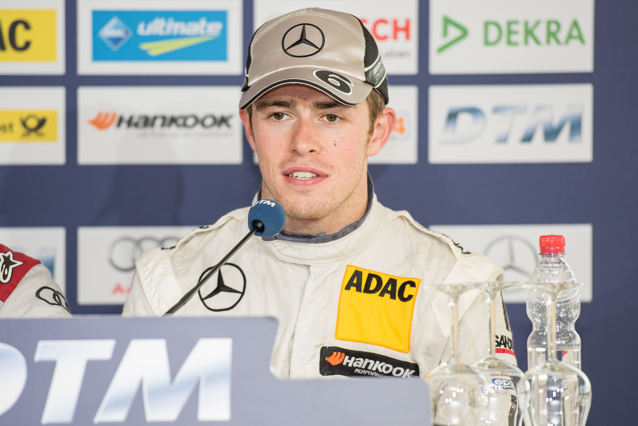 DTM,Deutsche Tourenwagen Masters,HWA AG,Hockenheimring,Motorsport,Paul di Resta,Pressekonferenz